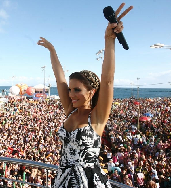 Ivete Sangalo no Carnaval de Salvador, em 2012.